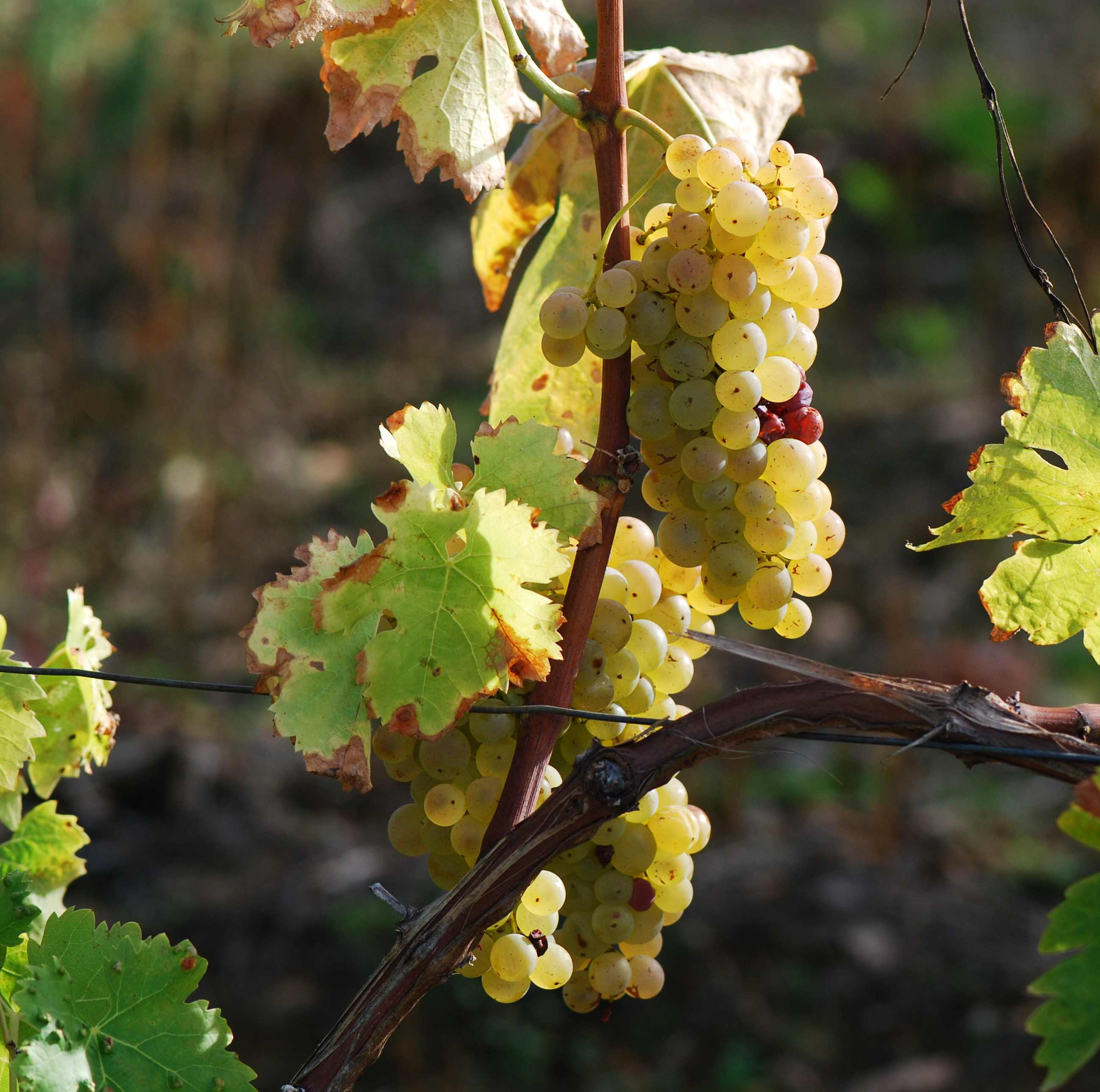 Vignes, région de Cognac